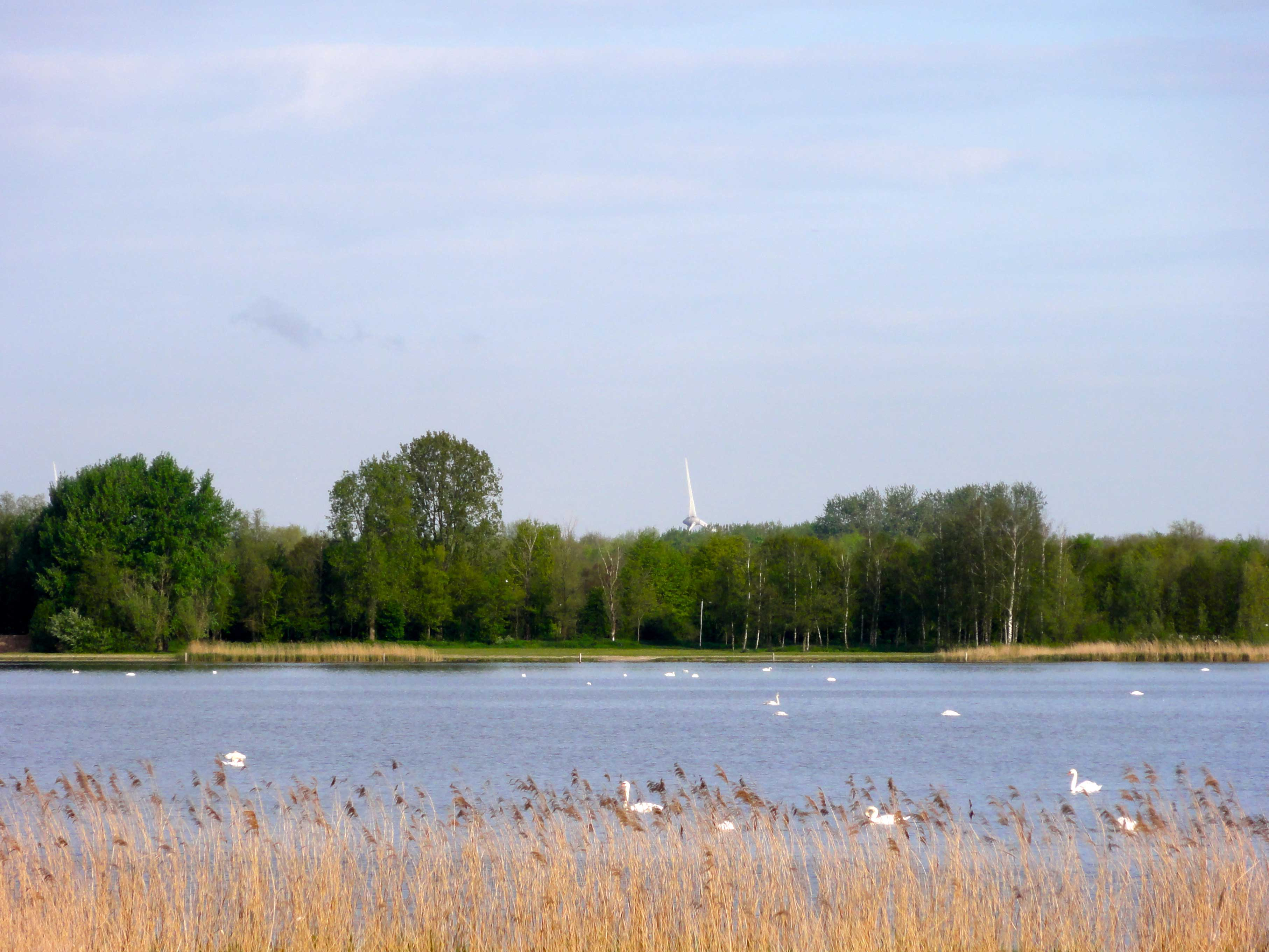 Het Veluwemeer vanaf de plaats waar de vroegere Ludgeruskerk heeft gestaan